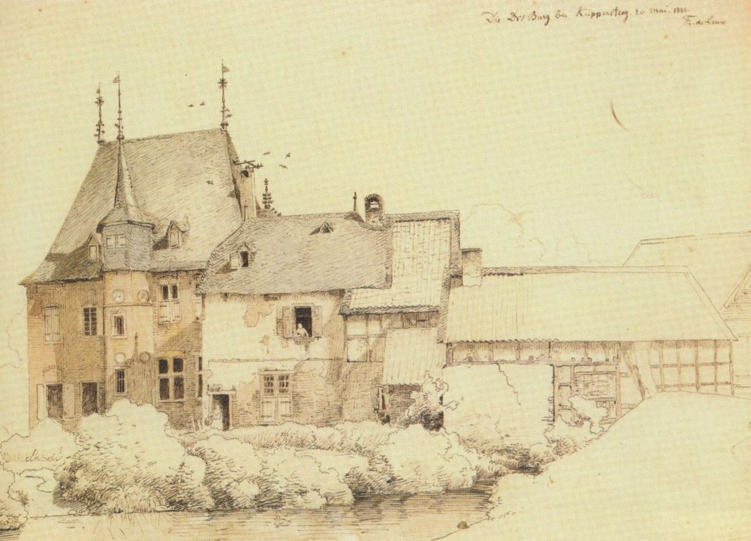 Die Doktorsburg in Leverkusen-Wiesdorf im Jahr 1846. Anstelle eines Vorgängerbaus 1682 errichtet. Aquarellierte Federzeichnung von Friedrich August de Leuw.